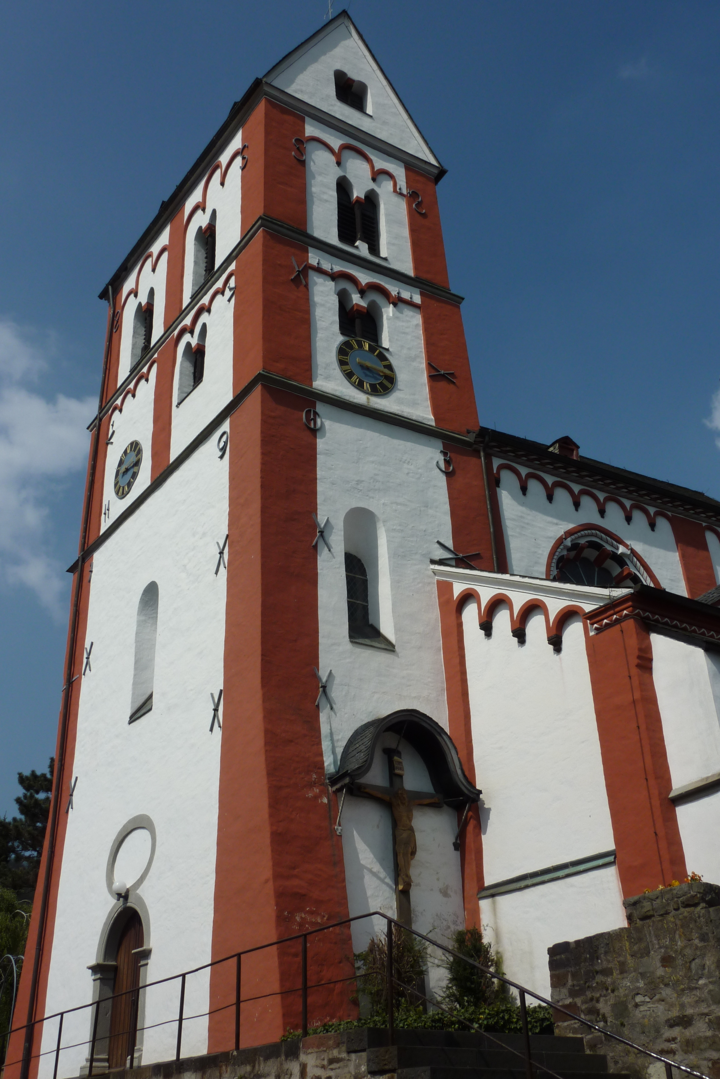 Oberbreisig, Katholische Pfarrkirche St. Viktor, Westturm